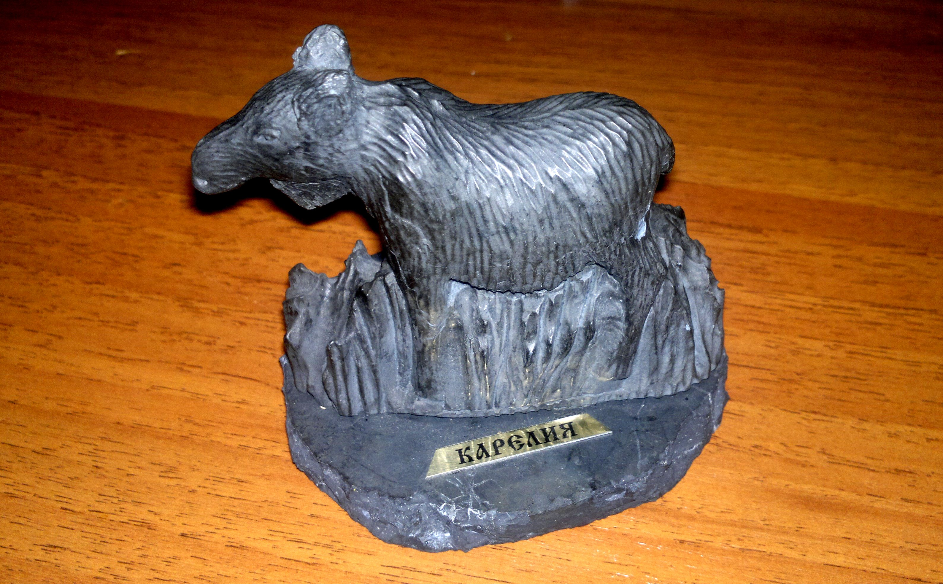 Такие изделия готовят карельские мастера из шунгита. Породу для поделки извлекли из Зажогинского месторождения.